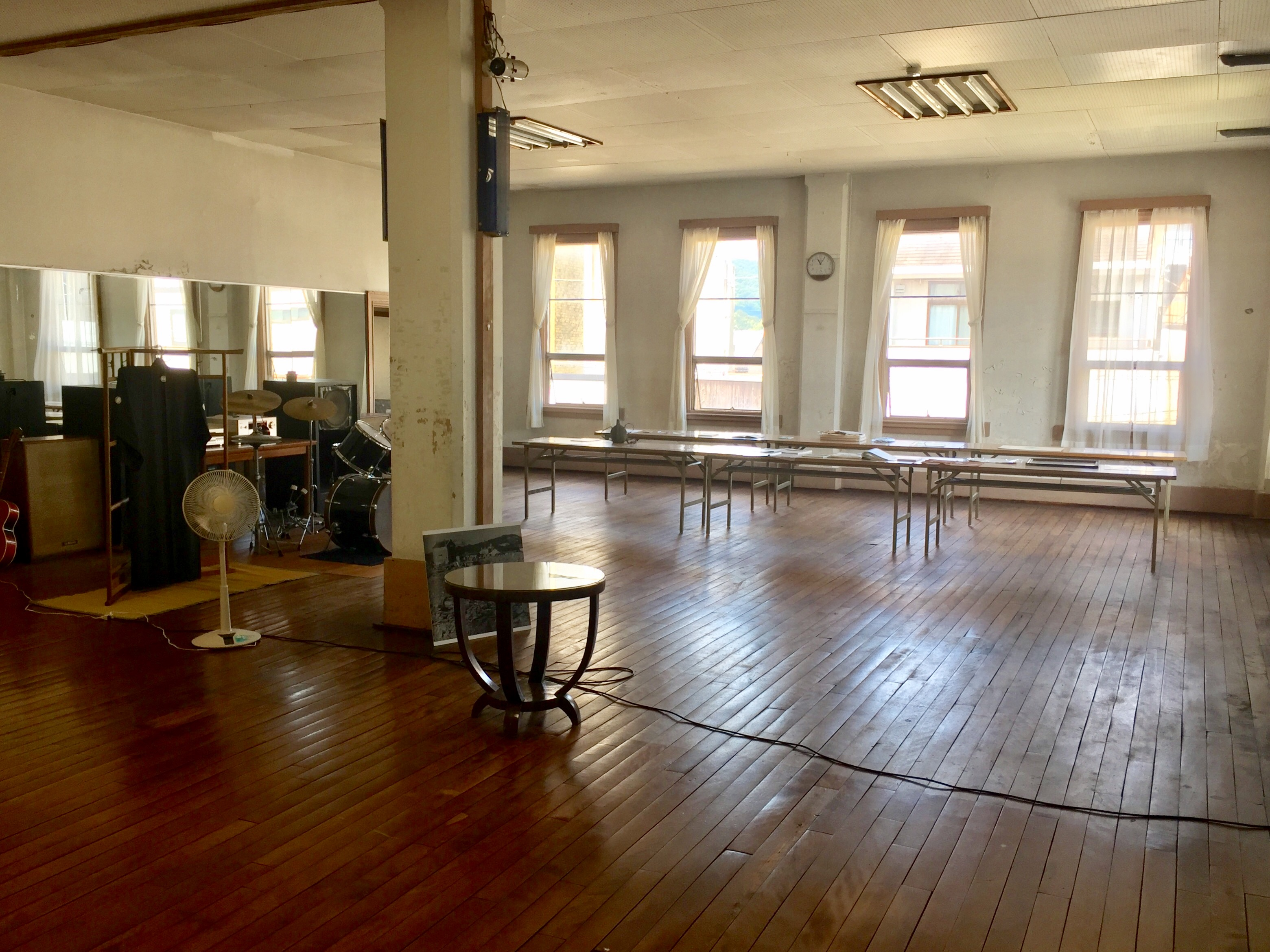 今治ラジウム温泉の2階大ホール。かつてはダンスホールとして使用されていたが、後年はクラシックバレエ教室となっていた。 ※見学会で許可を得て撮影